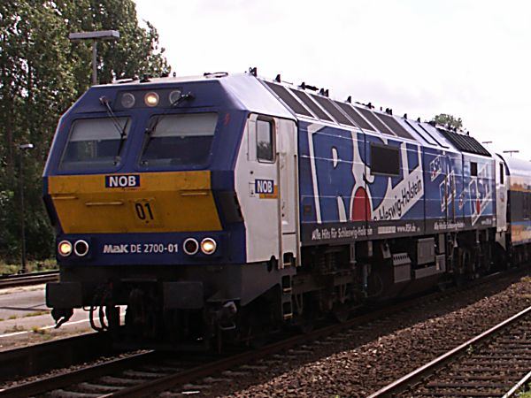 Nord-Ostsee-Bahn